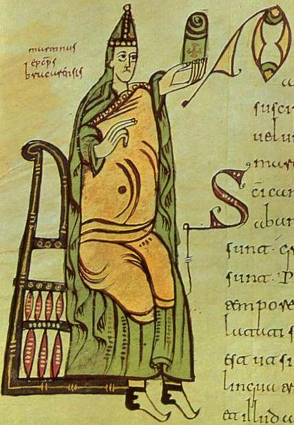 San Martín de Braga o de Dumio, miniatura del Códex Albeldensis, a. 976, Biblioteca del Monasterio de San Lorenzo de El Escorial, Madrid. dinosaurio!! ♥☺